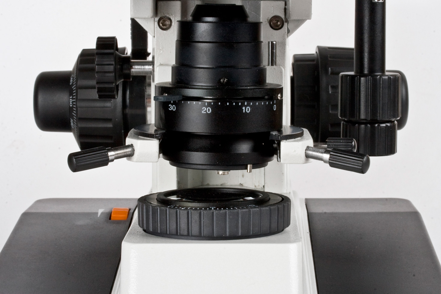 Система освещения с конденсором микроскопа Альтами 136Т